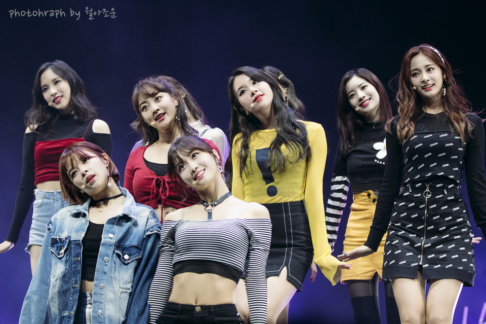 171030 트와이스 LIKEY 쇼케이스